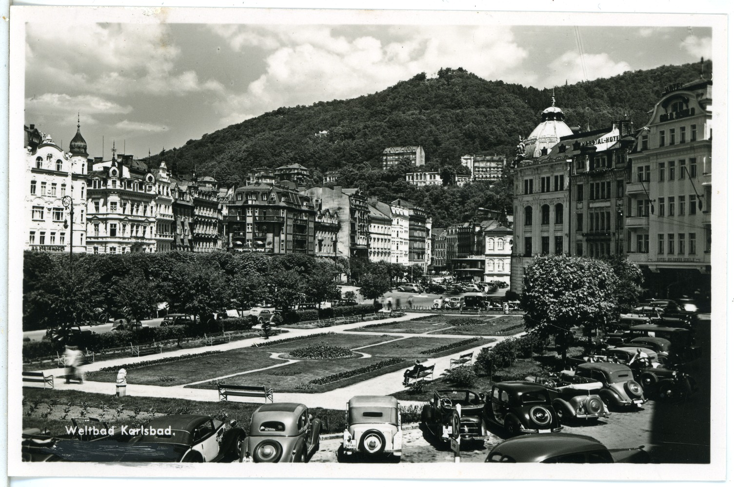 Karlsbad; Adolf-Hitler-Platz This postcard is from publisher Brück & Sohn in Meißen ( postcard has a unique number 27421 and is available in a higher resolution at the publisher. This images was uploaded in a cooperation project between Wikipedians and the publisher.